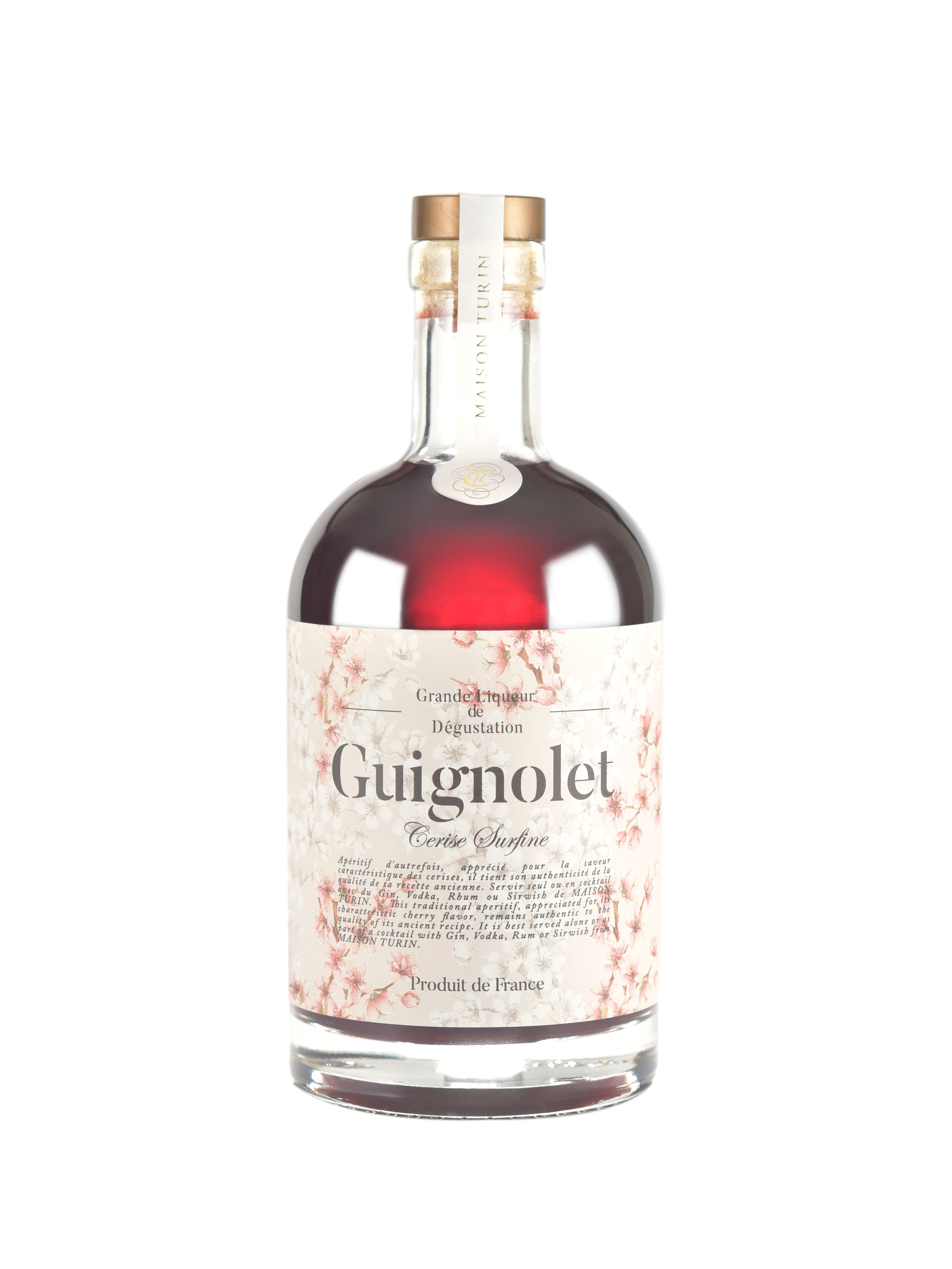 Le Guignolet de Maison Turin